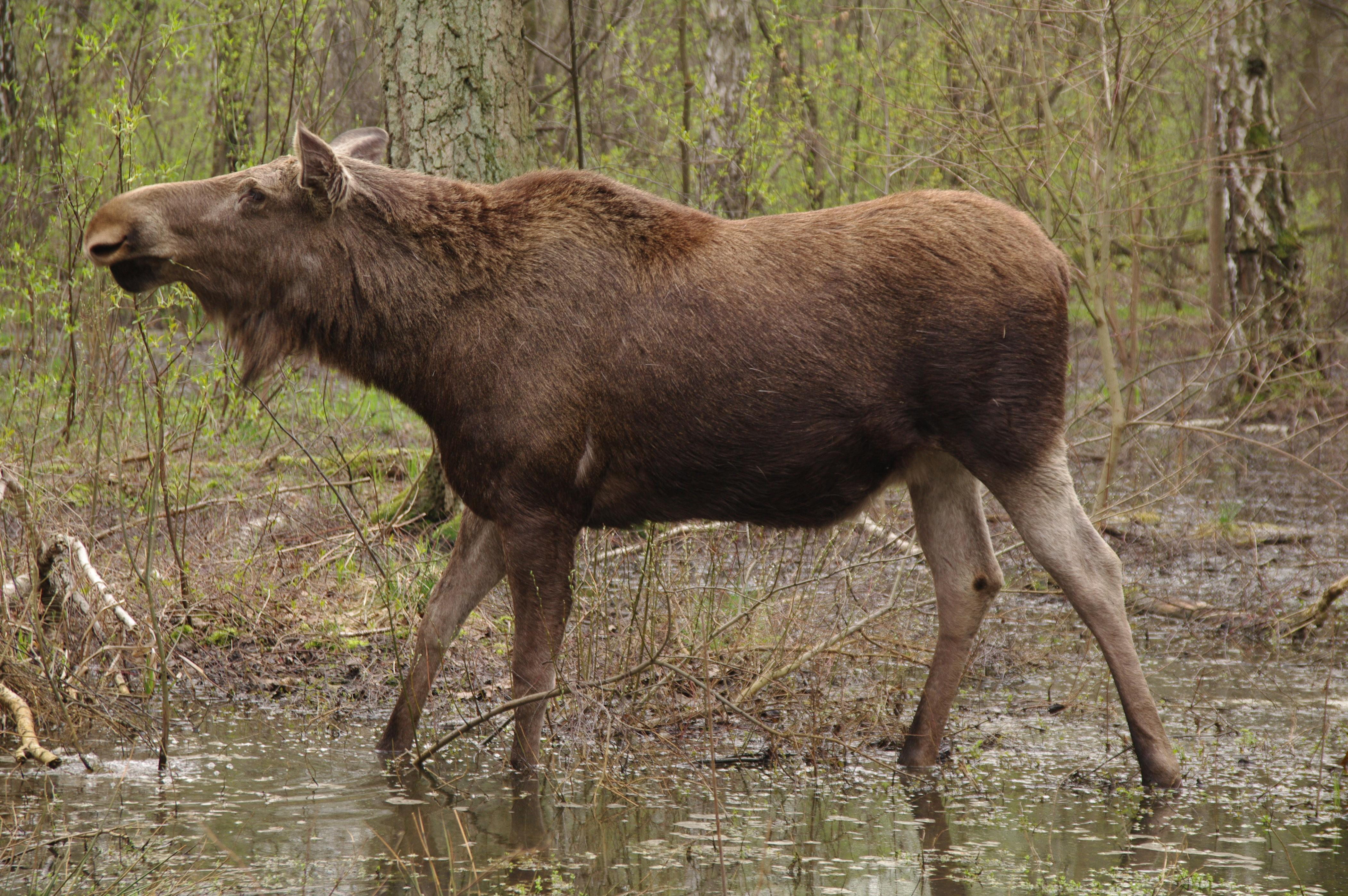 Klempa w Lesie Bemowskim